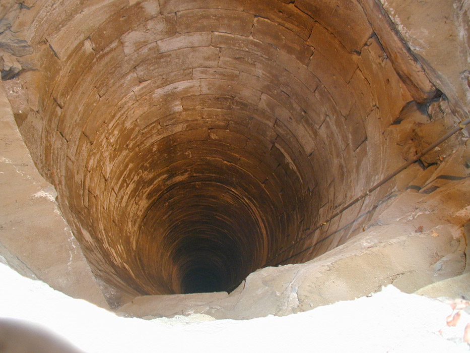 Blick in den Brunnen der Burg Königsberg i. Bay.